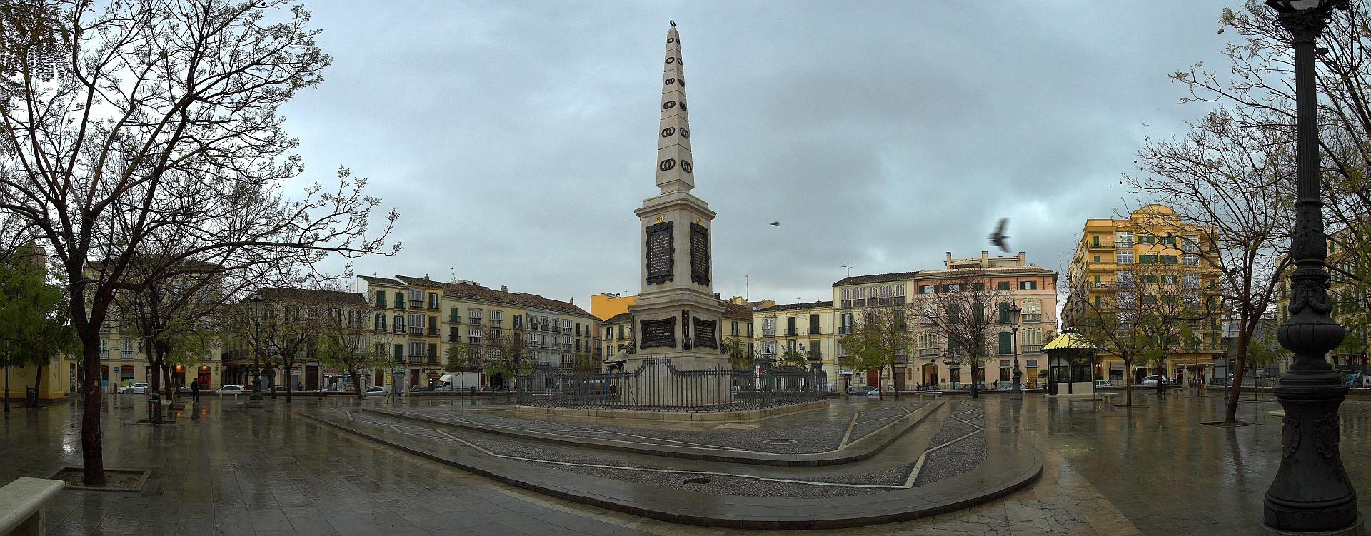 Panorámica de la Plaza de la Merced.